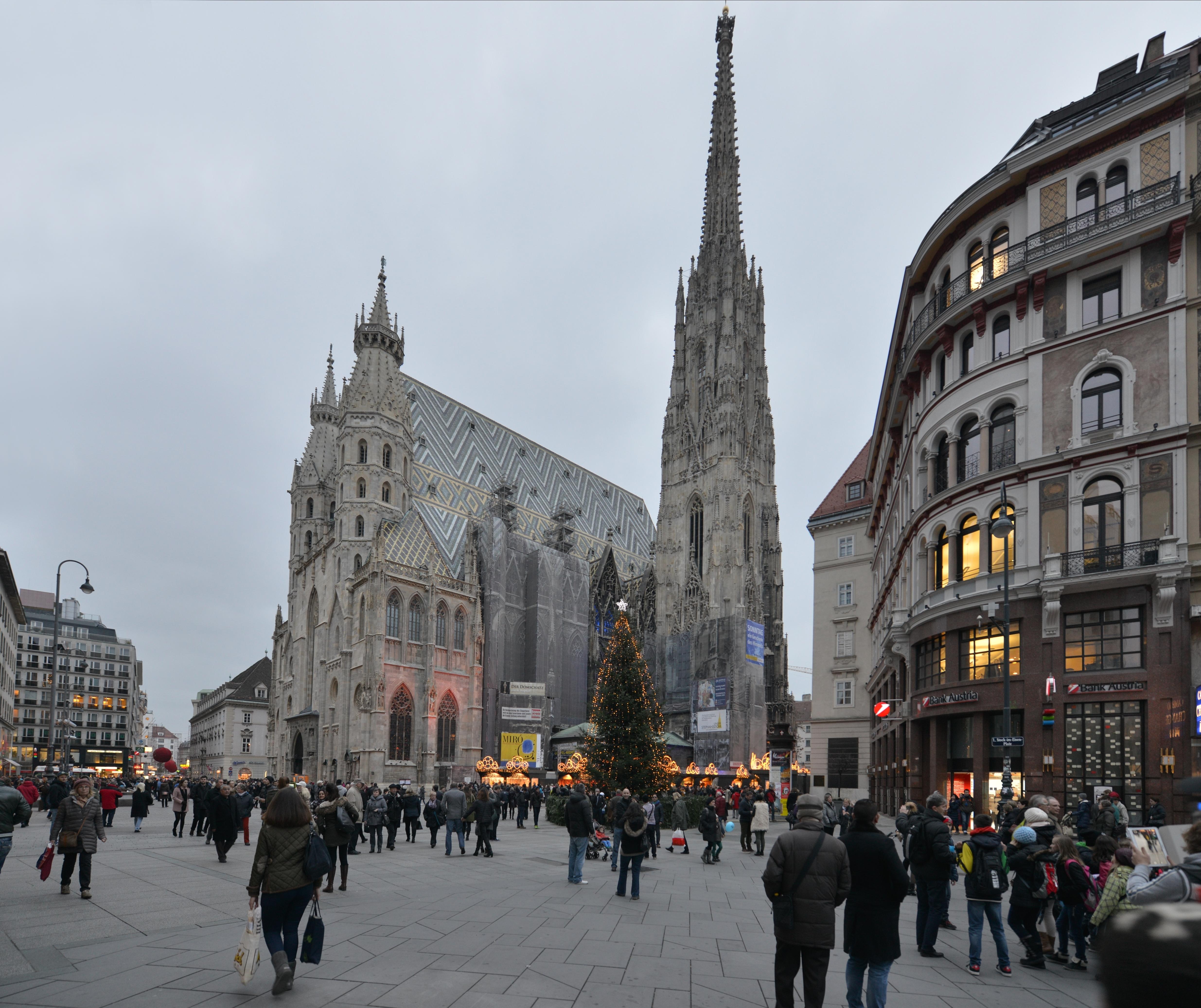 Der Stephansdom (Wien) in Wien.